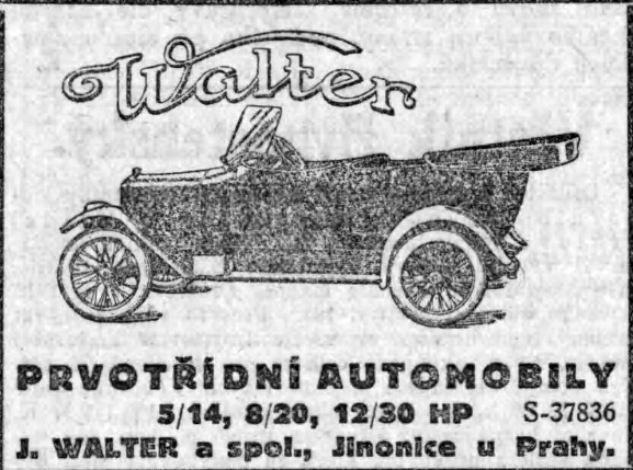 Inzerát v Národních listech na automobily Walter W-I, W-II, W-III (1914)